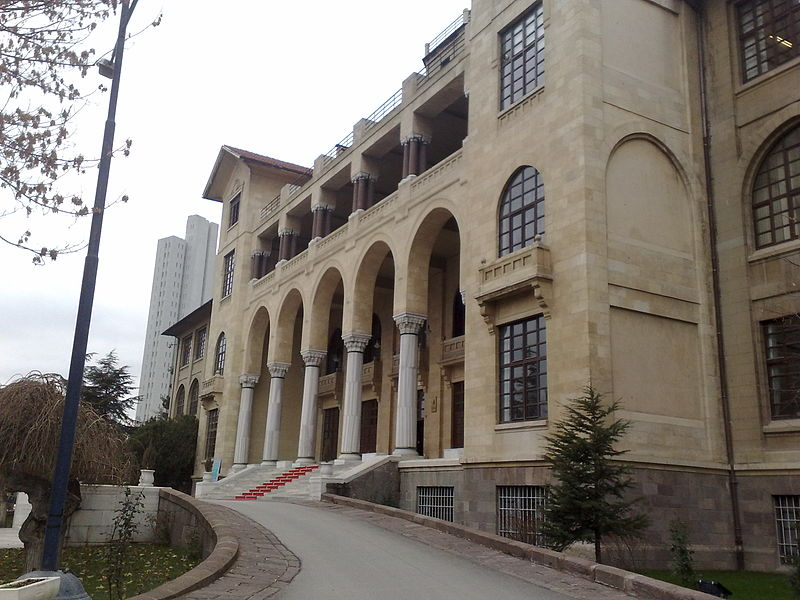 diğer_sürümler=